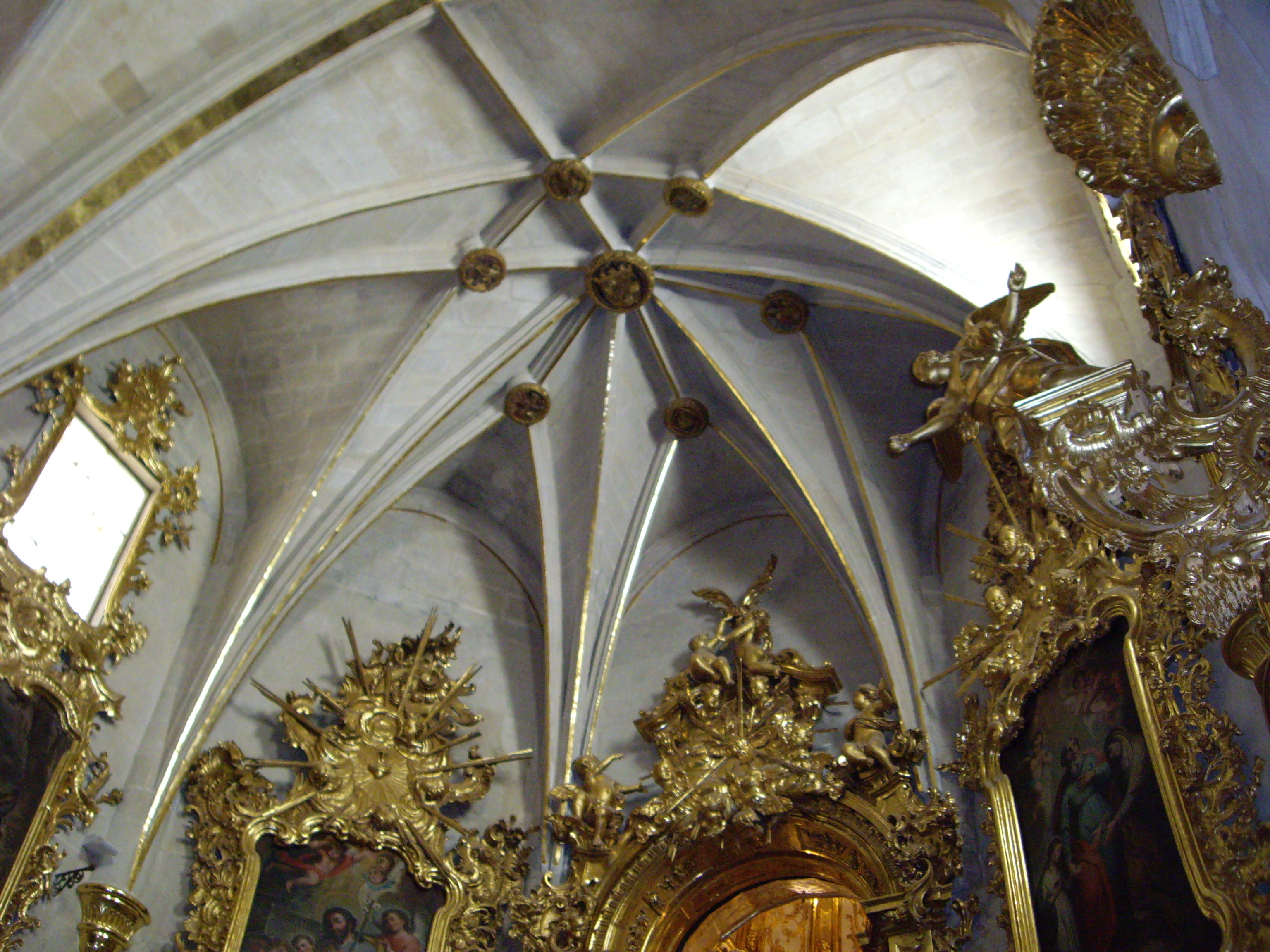 Església de Santa Maria, Alacant.